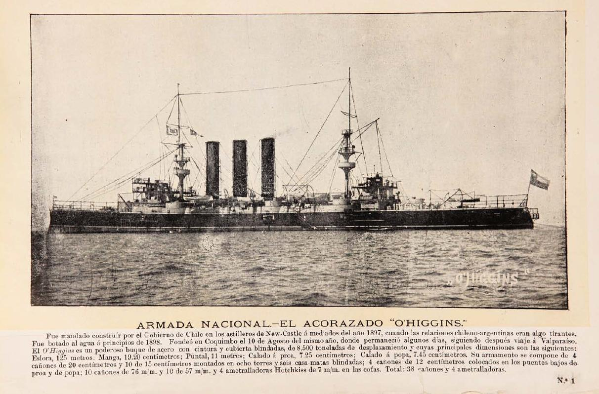 El O'Higgins fue un crucero acorazado que operó en la Armada de Chile entre 1898 y 1933. Durante la mayor parte de ese tiempo se desempeñó como buque insignia de dicha escuadra. Fue la unidad más poderosa de esa fuerza hasta la recepción en 1921 del acorazado dreadnought Latorre.